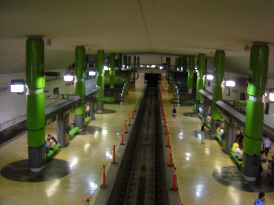 Estación Cuauhtemoc del metro de Monterrey México